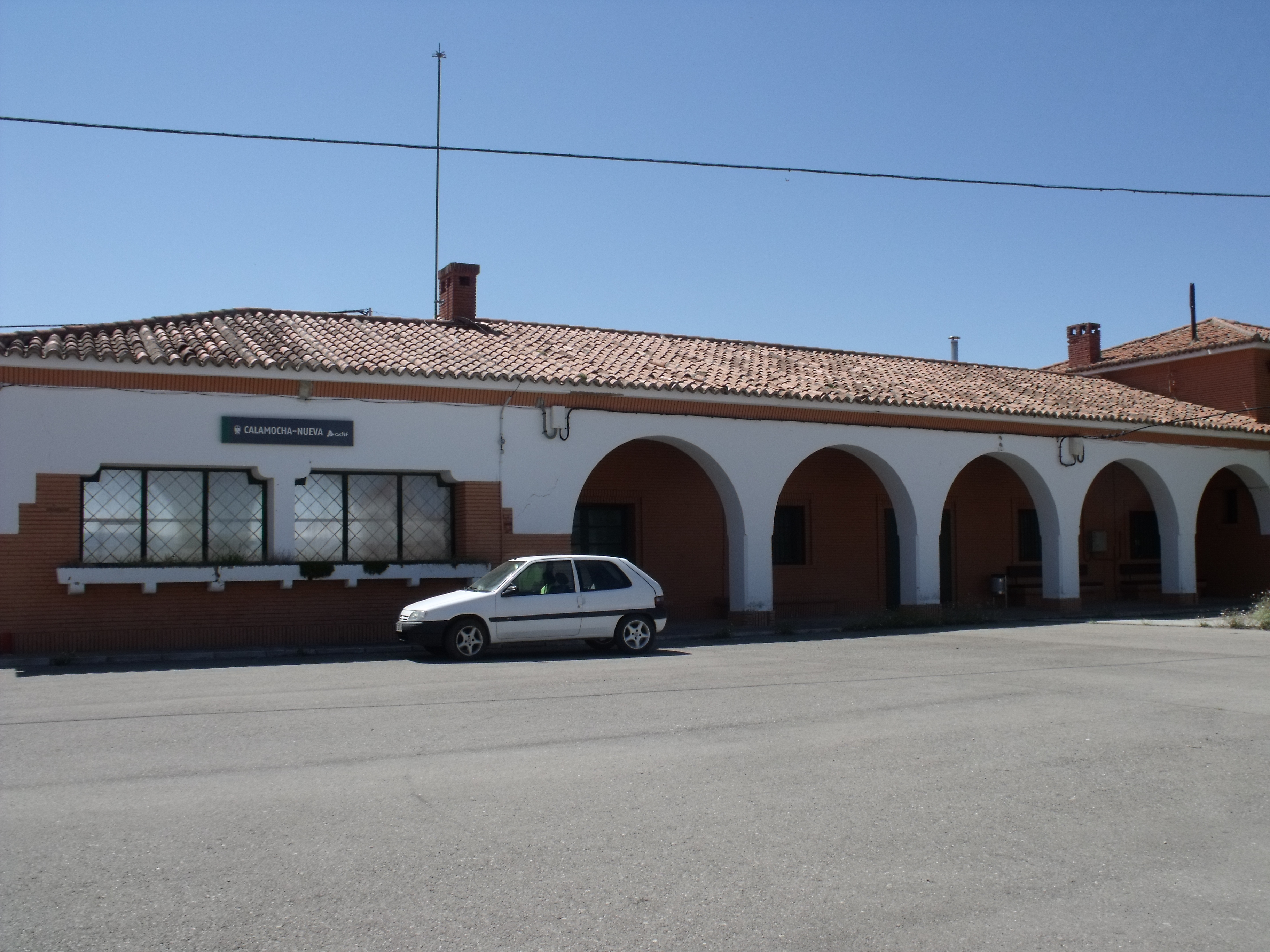 Estación de ferrocarril Calamocha-Nueva (provincia de Teruel, Aragón).